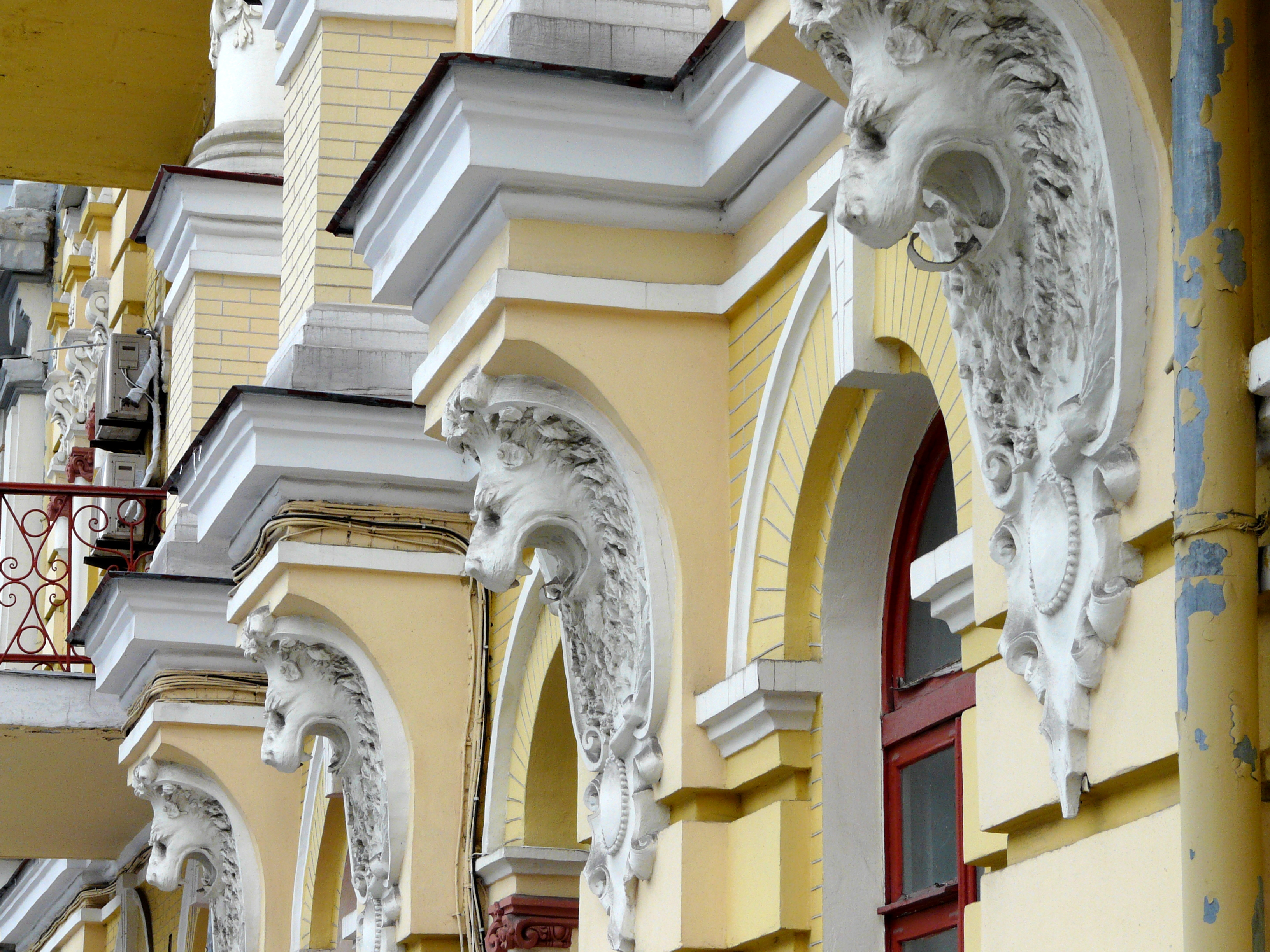 Будинок житловий, в якому проживали О. В. Баранецький, фізіолог і анатом рослин, М. Й. Шапіро, стоматолог, Київ, Пушкінська вул., 33-а